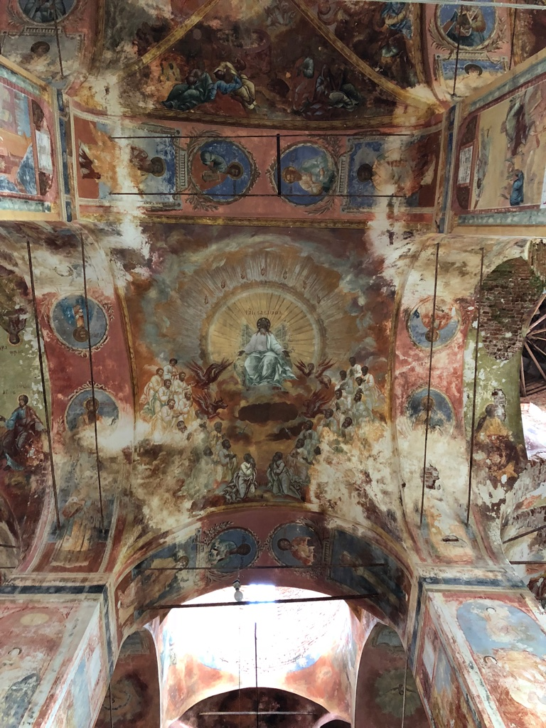 Росписи и устройство потолков в церкви Рождества Богородицы села Великого Ярославской области.